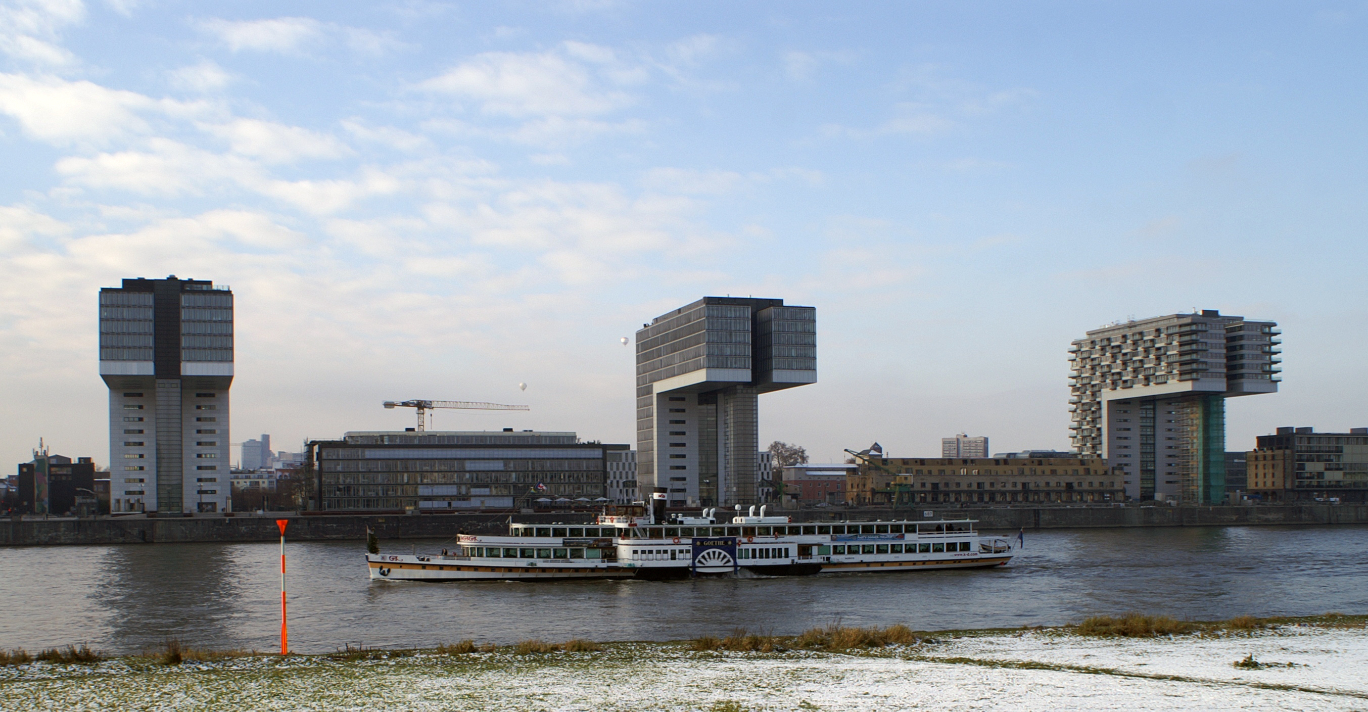 Der Raddampfer Goethe auf Fahrt an den Kranhäusern in Köln.